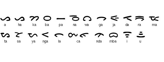 alphabet Batak libre d'utilisation.